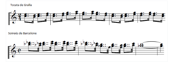 Fragment del ballet Soireés de Barcelone de Robert Gerhard fent referència a la melodia de la cançóTocata de Gralla.